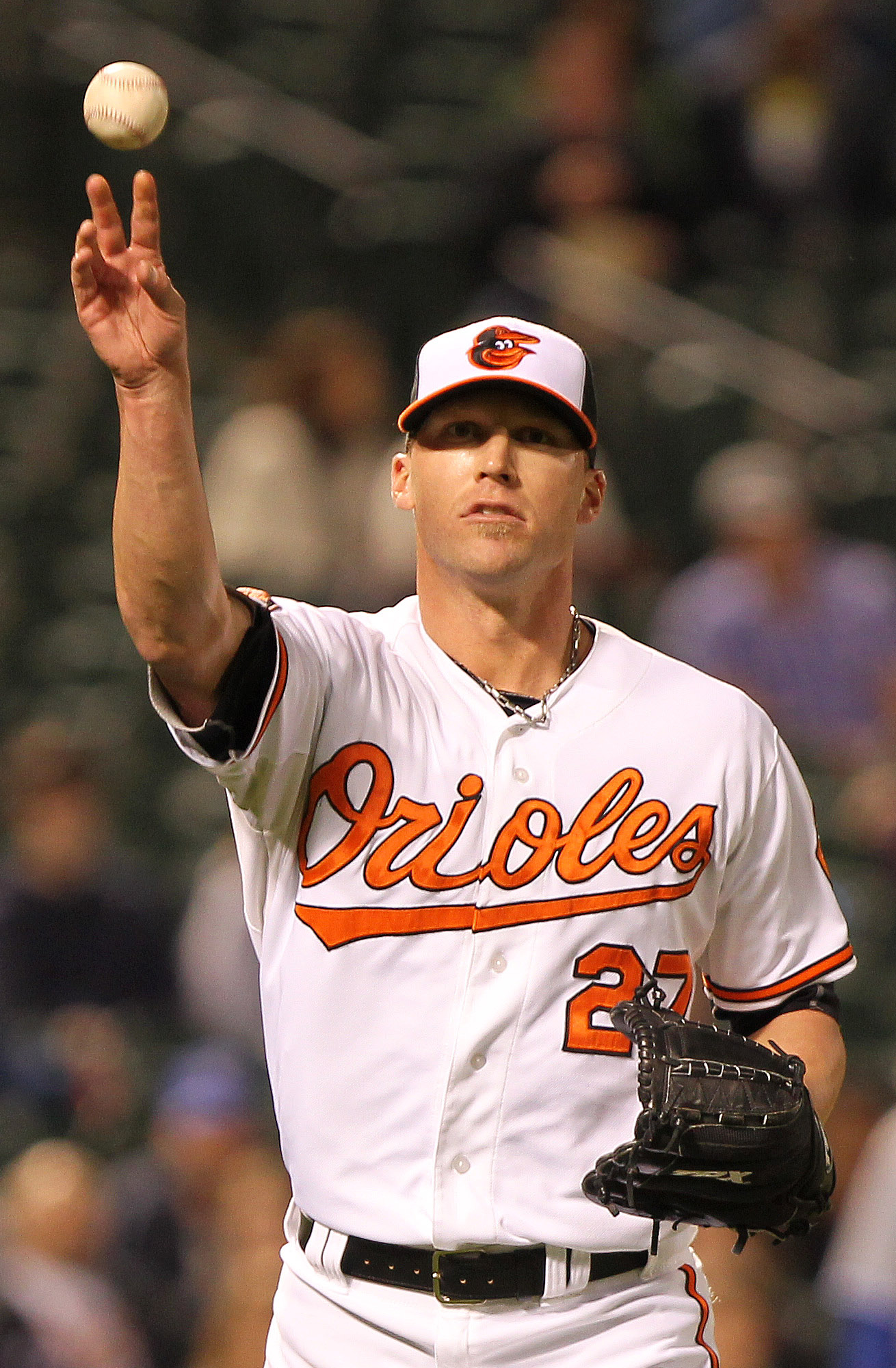 Matt Lindstrom